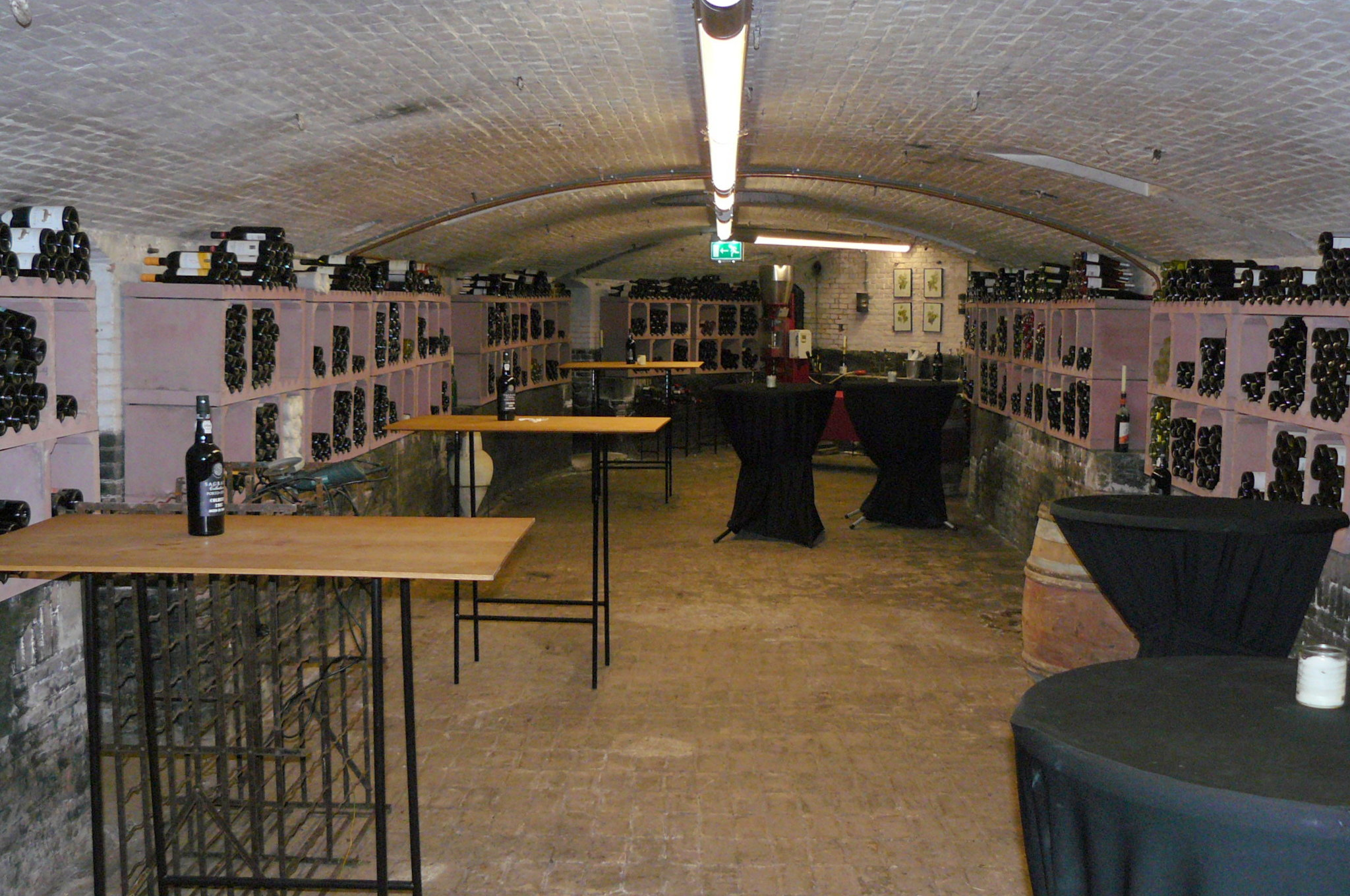 Het fort is in gebruik voor de opslag en verkoop van wijn. Dit is de centrale hal in de kelder. Links van deze hal liggen diverse vertrekken. Er zijn twee ronde trappen tussen de twee verdiepingen.